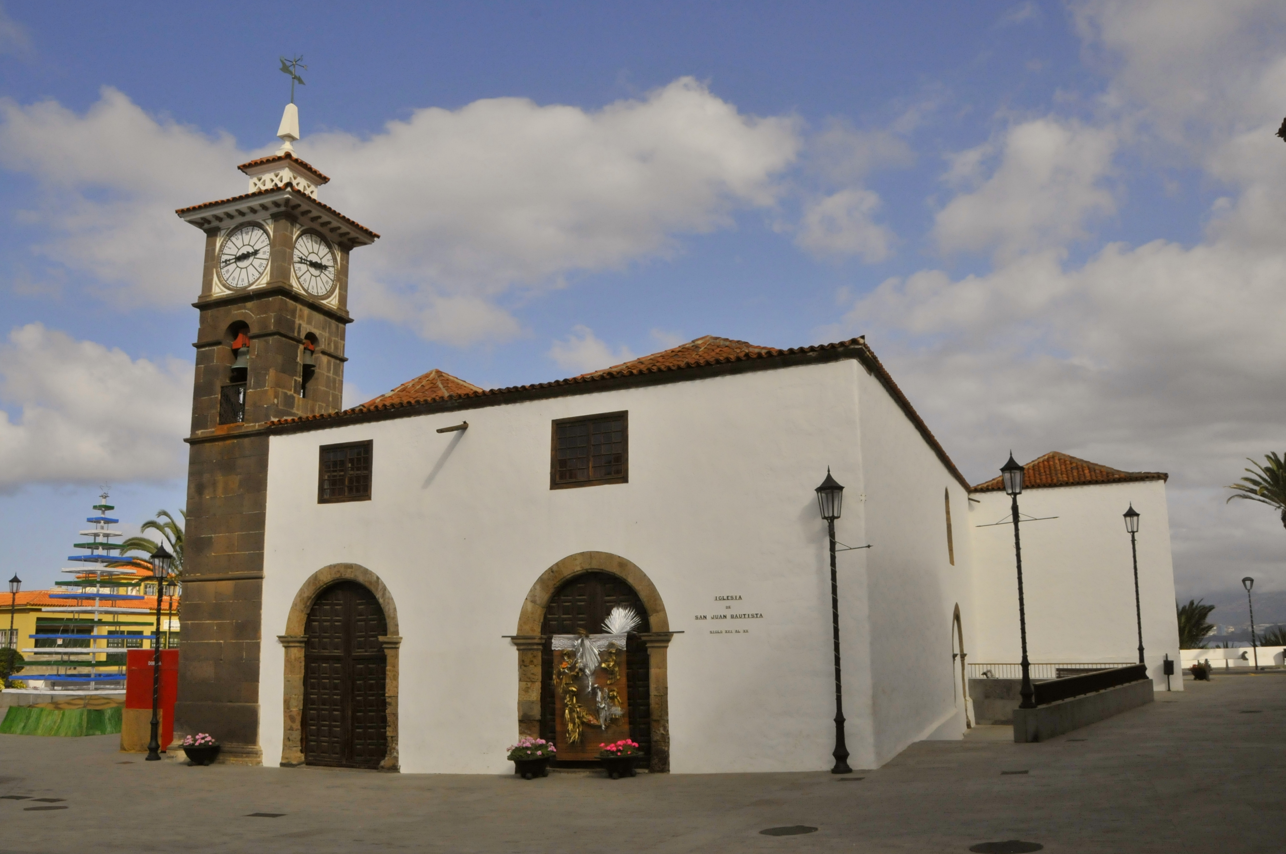 Kirche in San Juan de la Rambla, Teneriffa